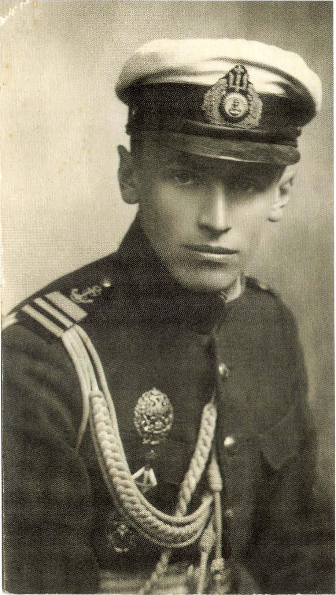 Святослав Шрамченко в униформе УДФ.